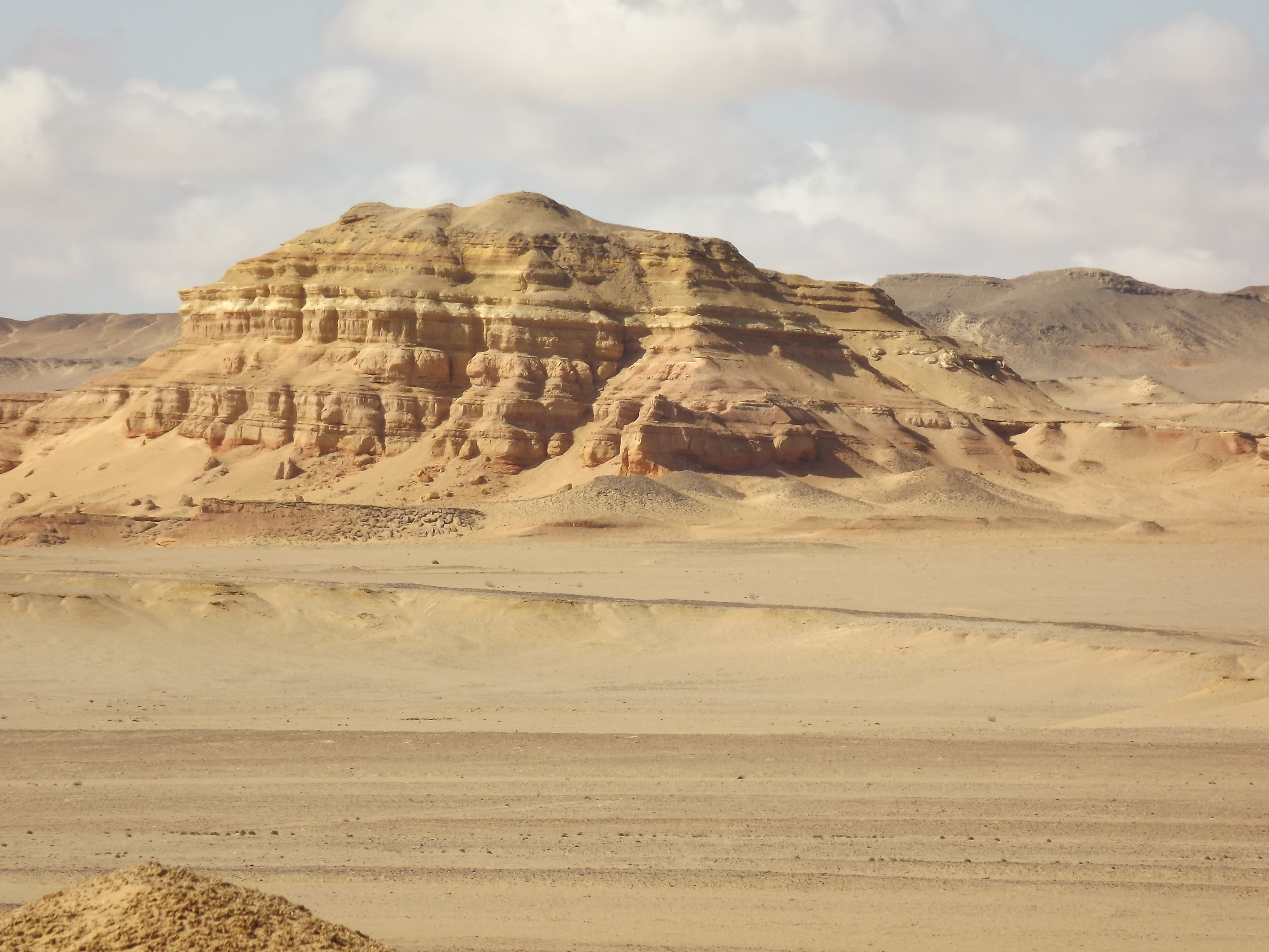 محمية قارون - الفيوم